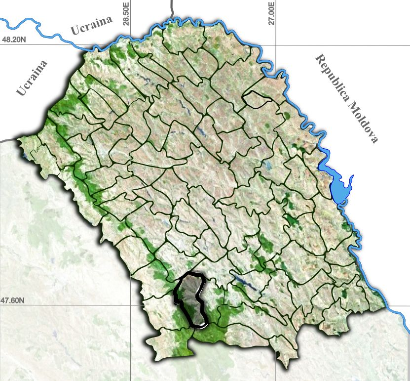 Cristesti jud Botosani.